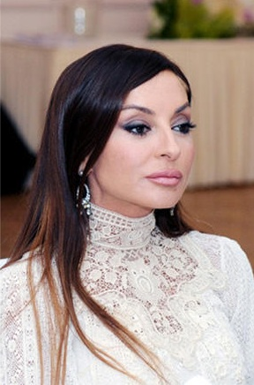 Мехрибан Алиева-Президент АГФ